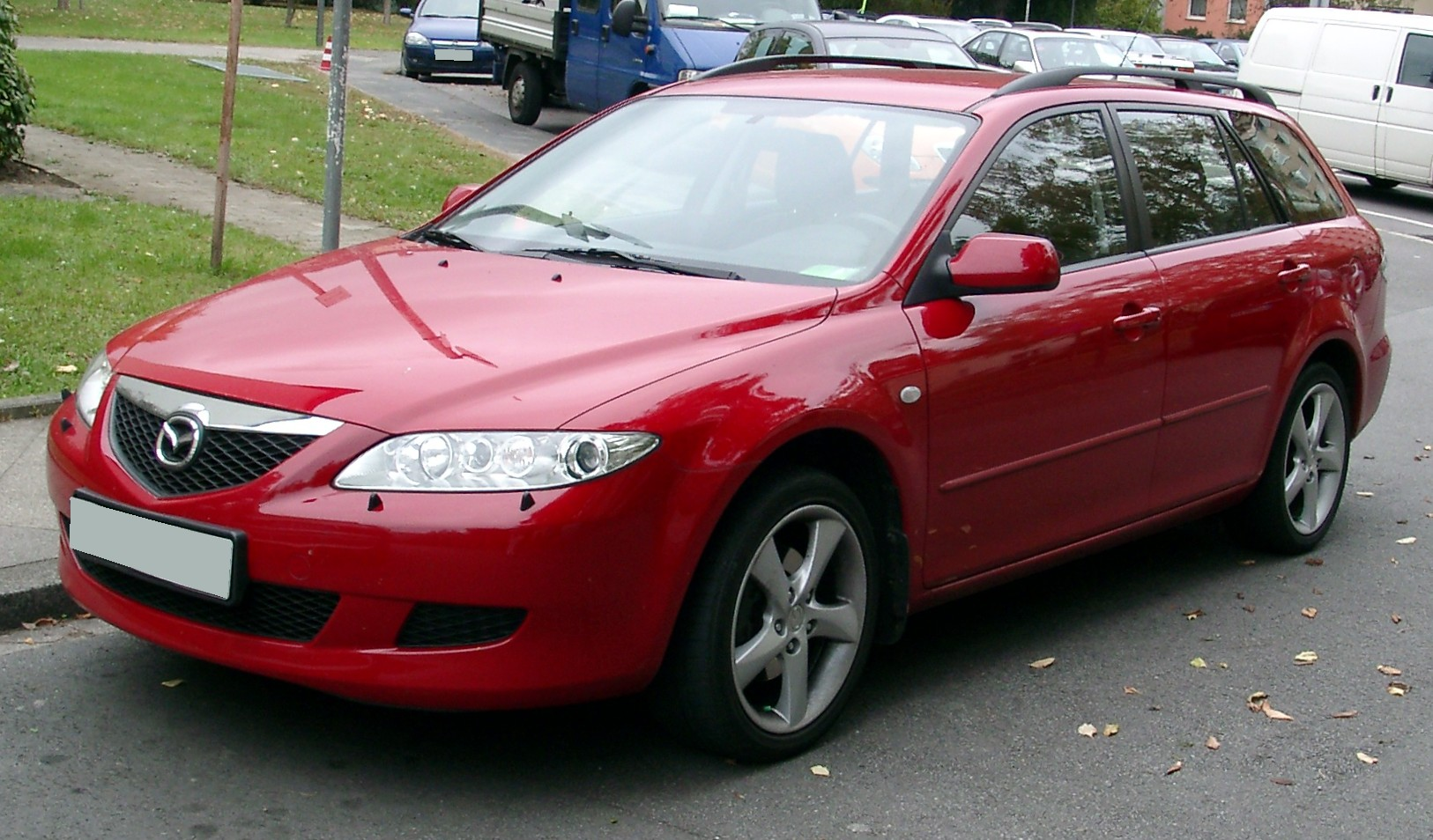 Mazda 6 Kombi